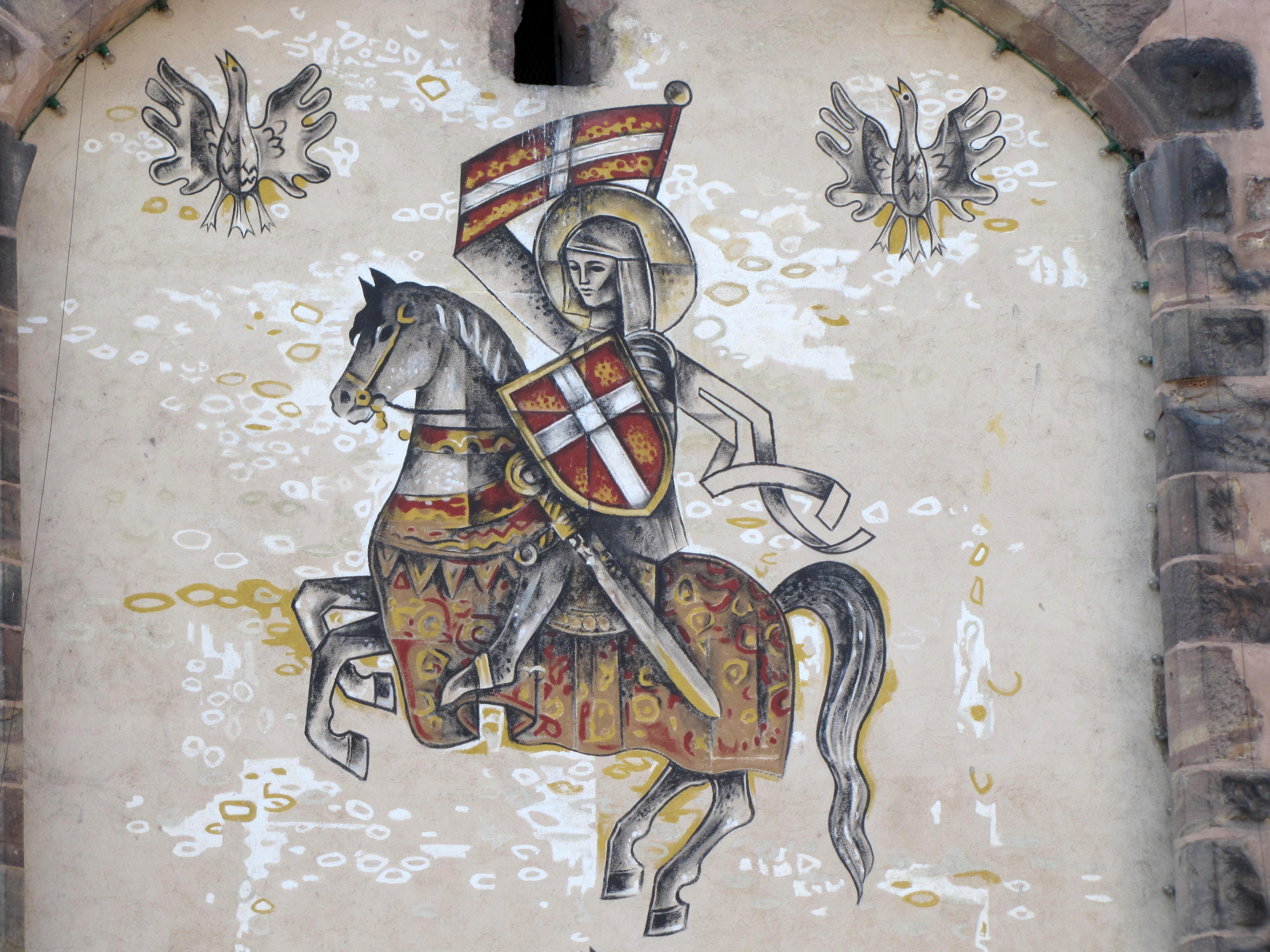 Alsace, Bas-Rhin, Mutzig, Porte de Strasbourg (XIVe-XVIIIe), rue du Maréchal-Foch (PA00084816, IA67011484).